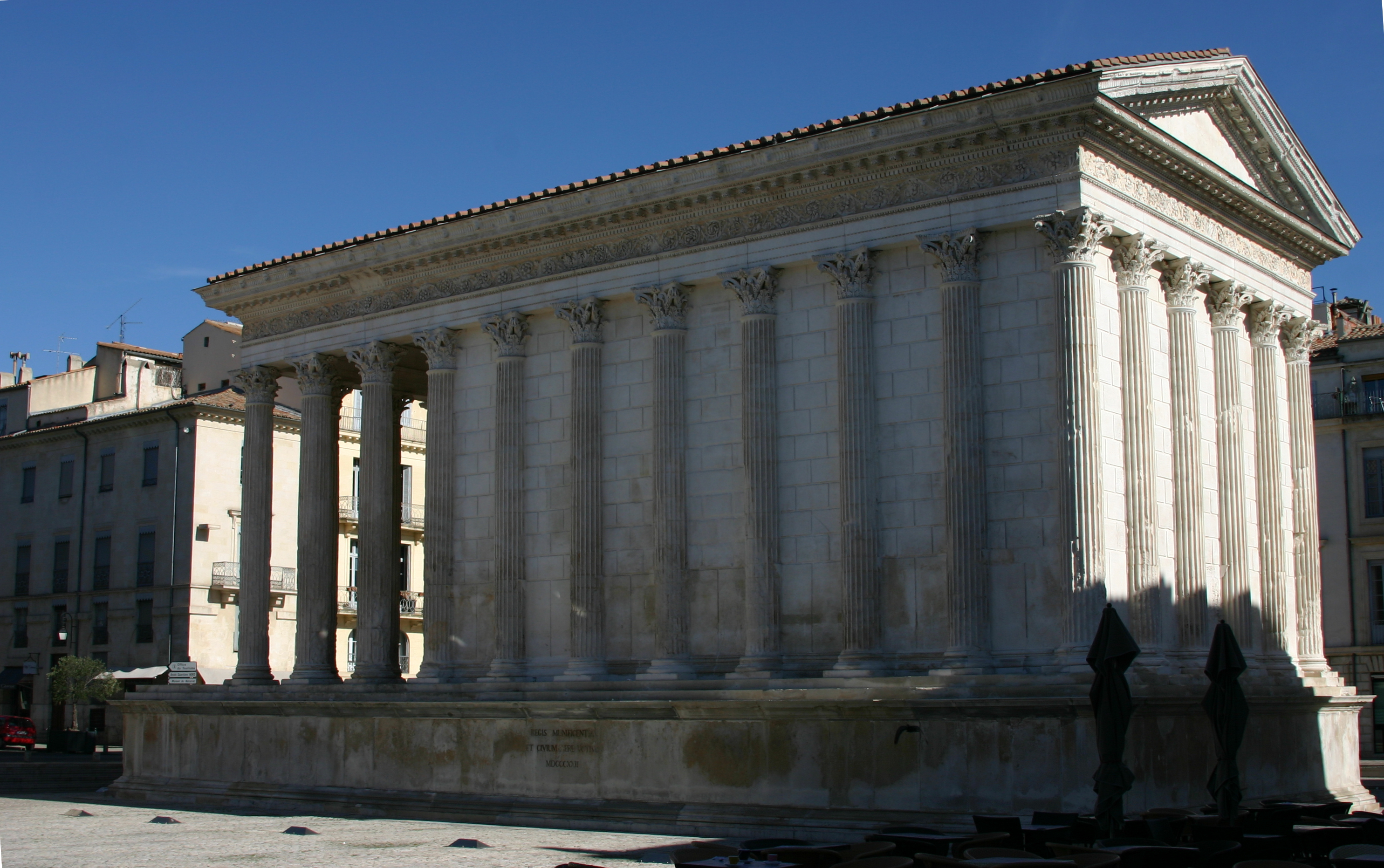 Maison CarrèeСаха тыла: Maison Carrèe